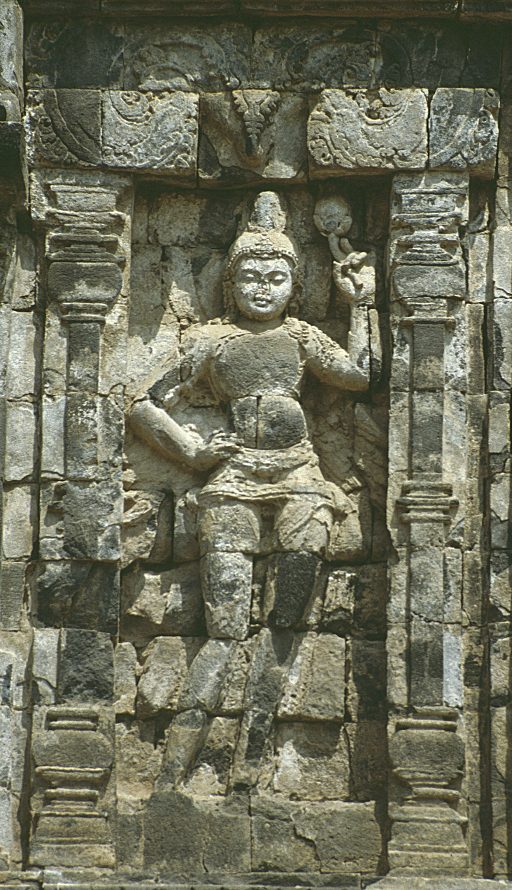 Relief am buddhistischen Tempel Sari